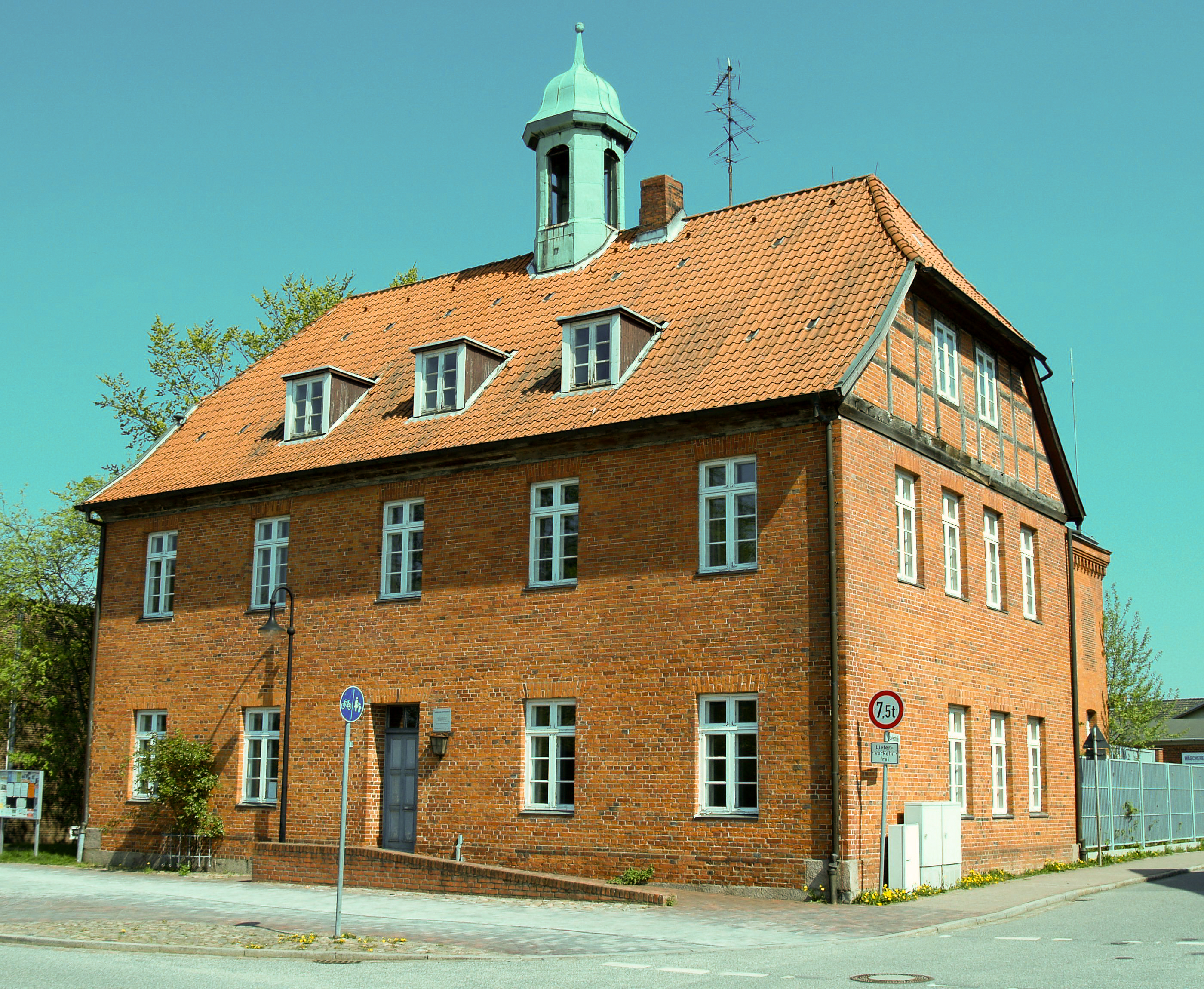 Das ehemalige Amtsgericht in Schwarzenbek